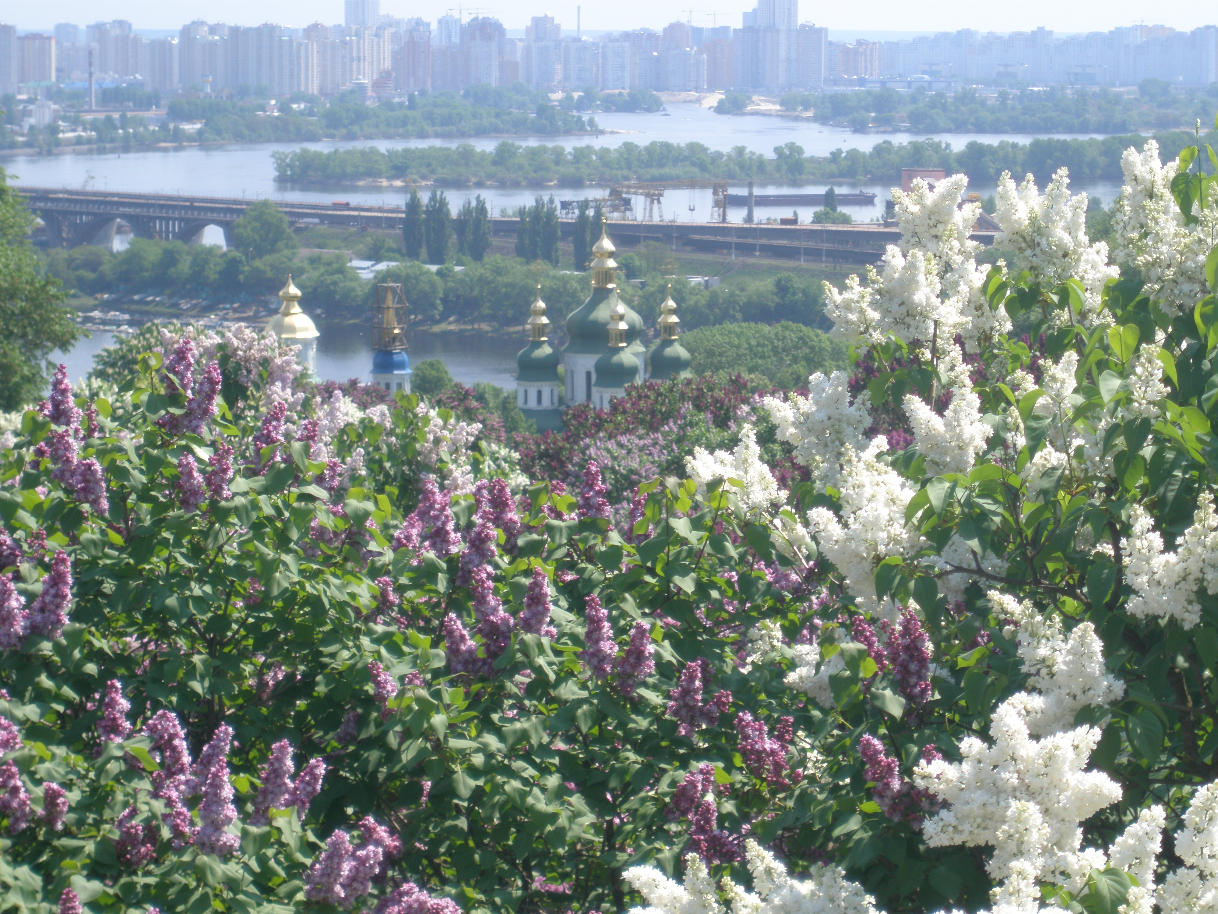 Новый ботанический сад на печерске